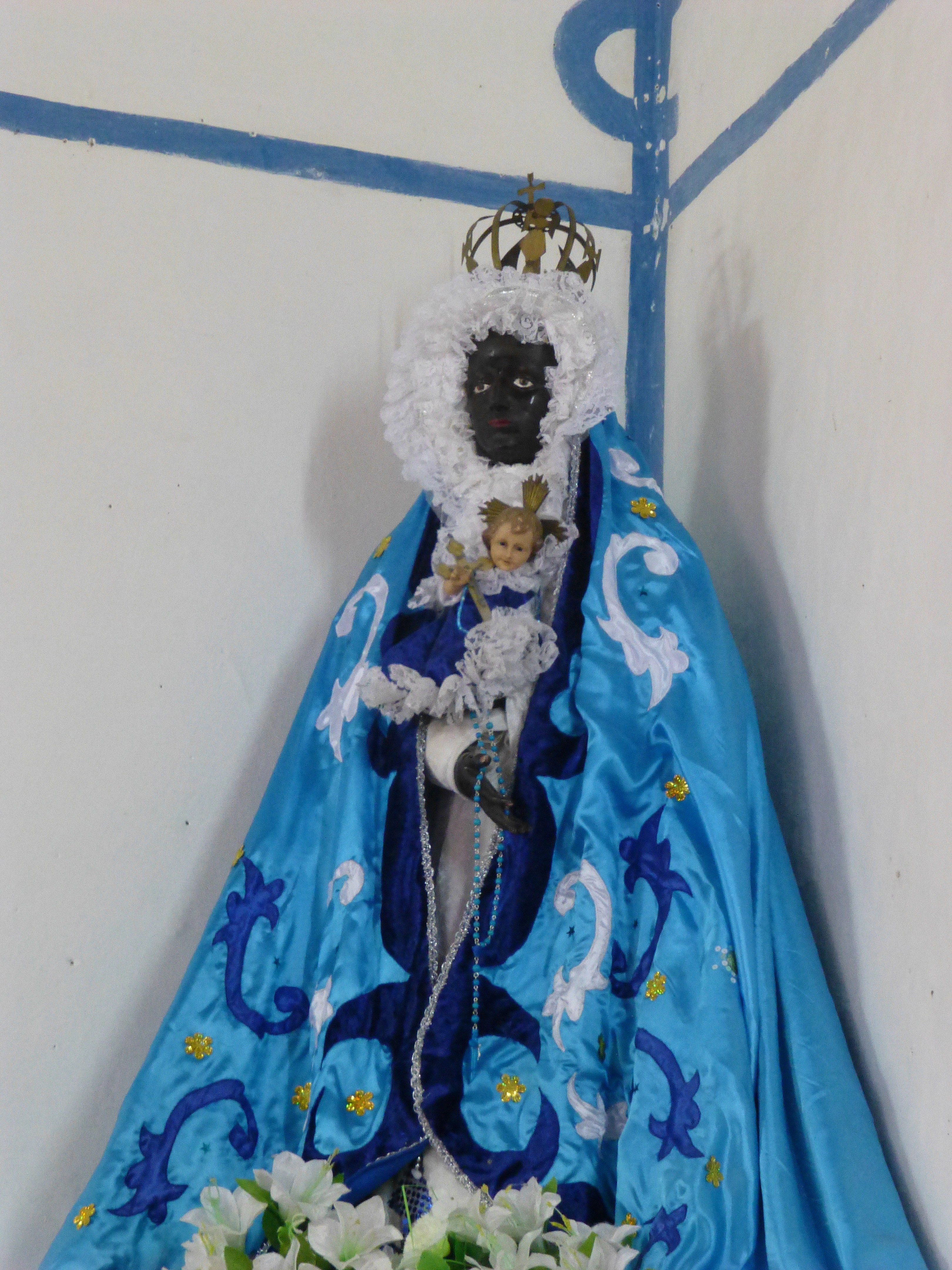 Santería à Trinidad (Cuba) : Templo Yemalla (Yemayá)